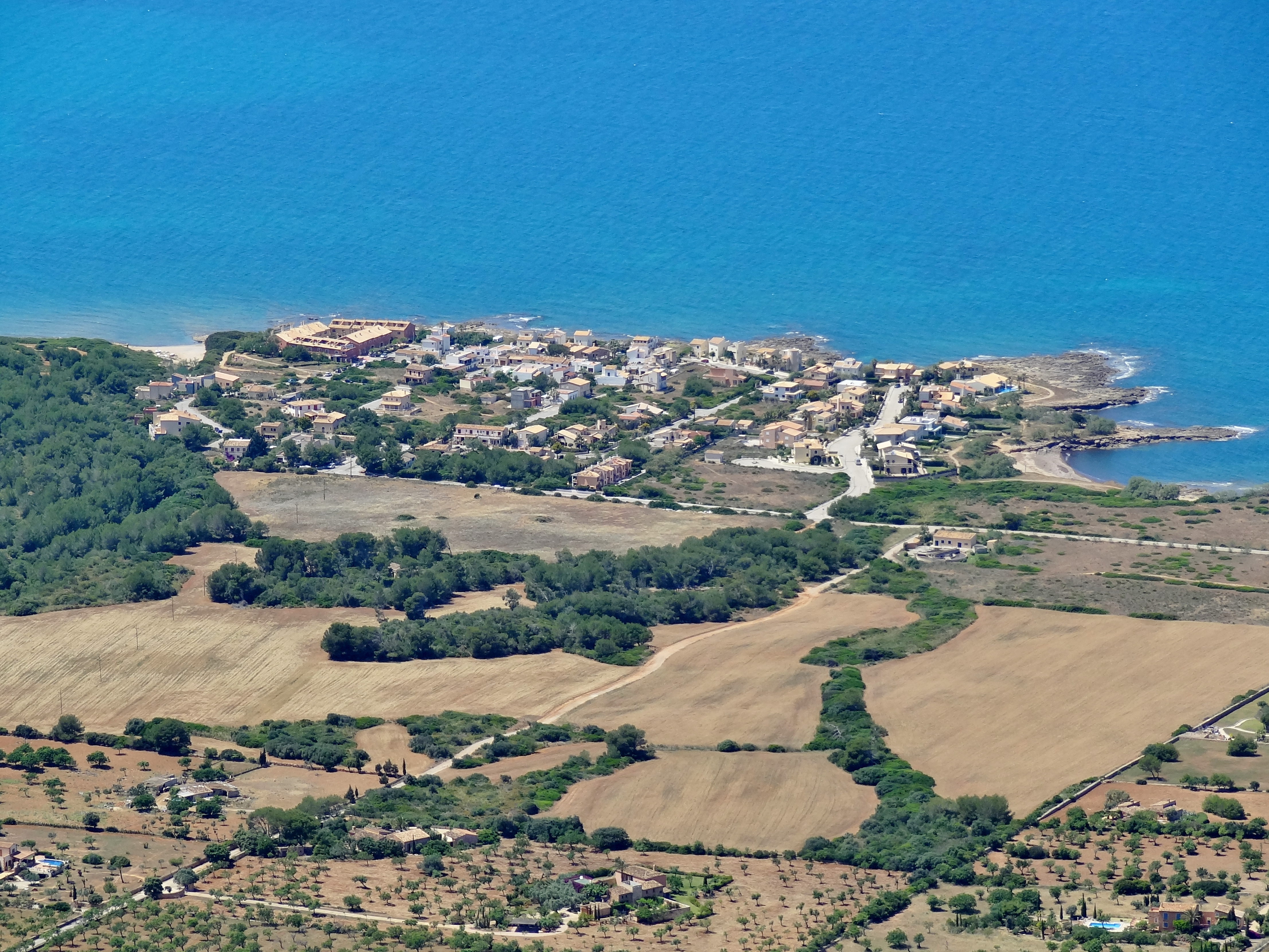 Die Siedlung S’Estanyol an der Badia d’Alcúdia (‚Bucht von Alcúdia‘) in der Gemeinde Artà, Mallorca, Spanien